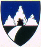 Wappen von Saas-Balen